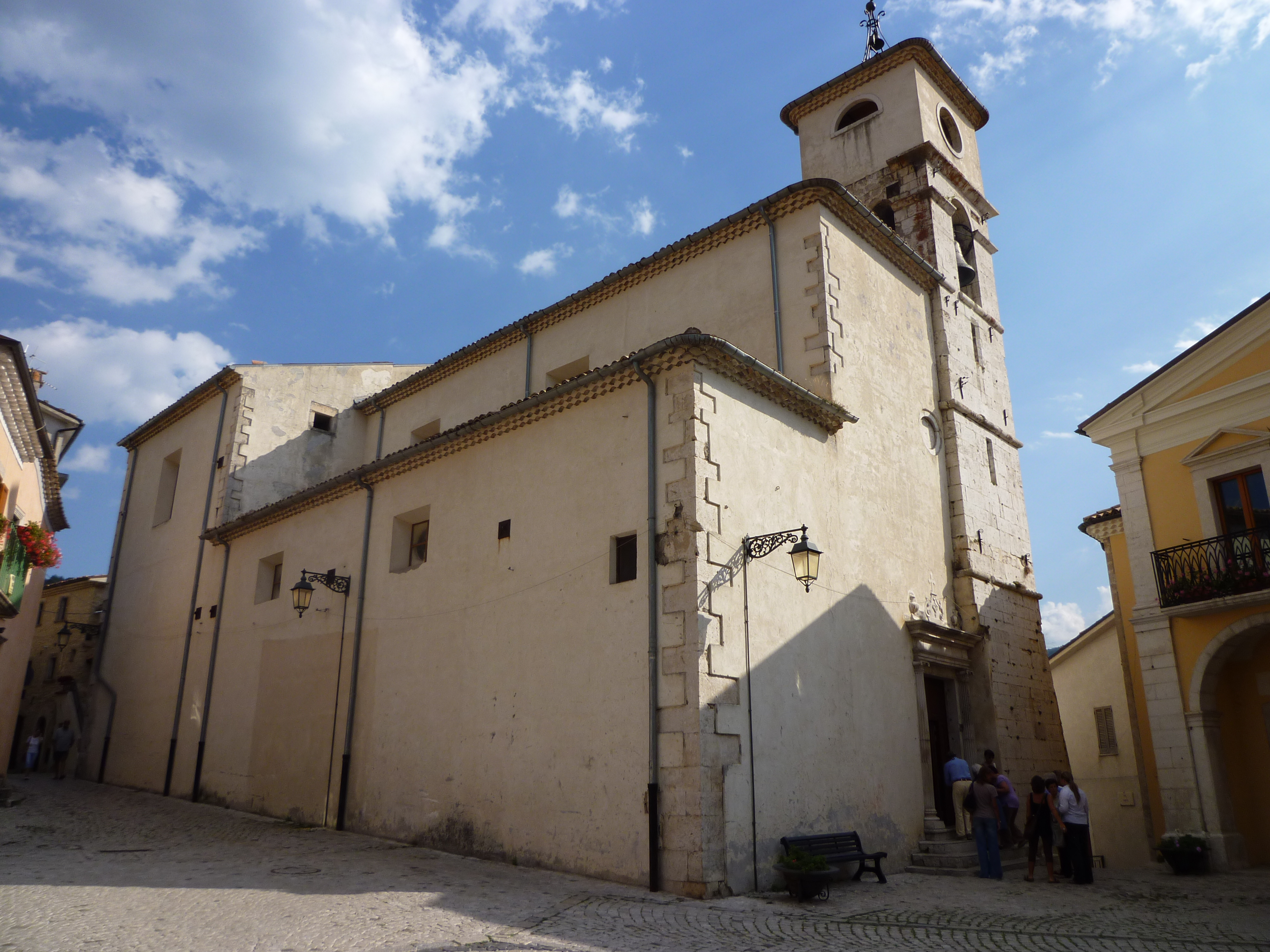 Chiesa di San Tommaso Apostolo. Barrea, L'Aquila.